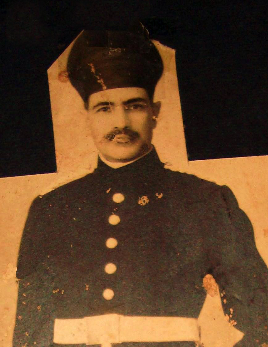 Nawab Alam yar jung, chief justice, law minister OF AP.